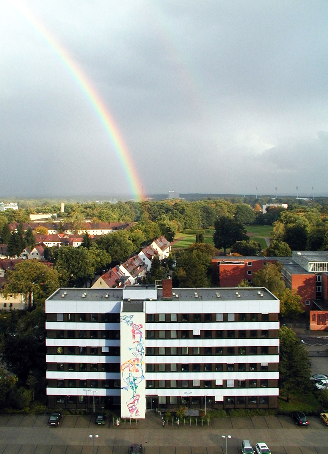 Institut für Arbeitsmarkt- und Berufsforschung (IAB) in Nürnberg